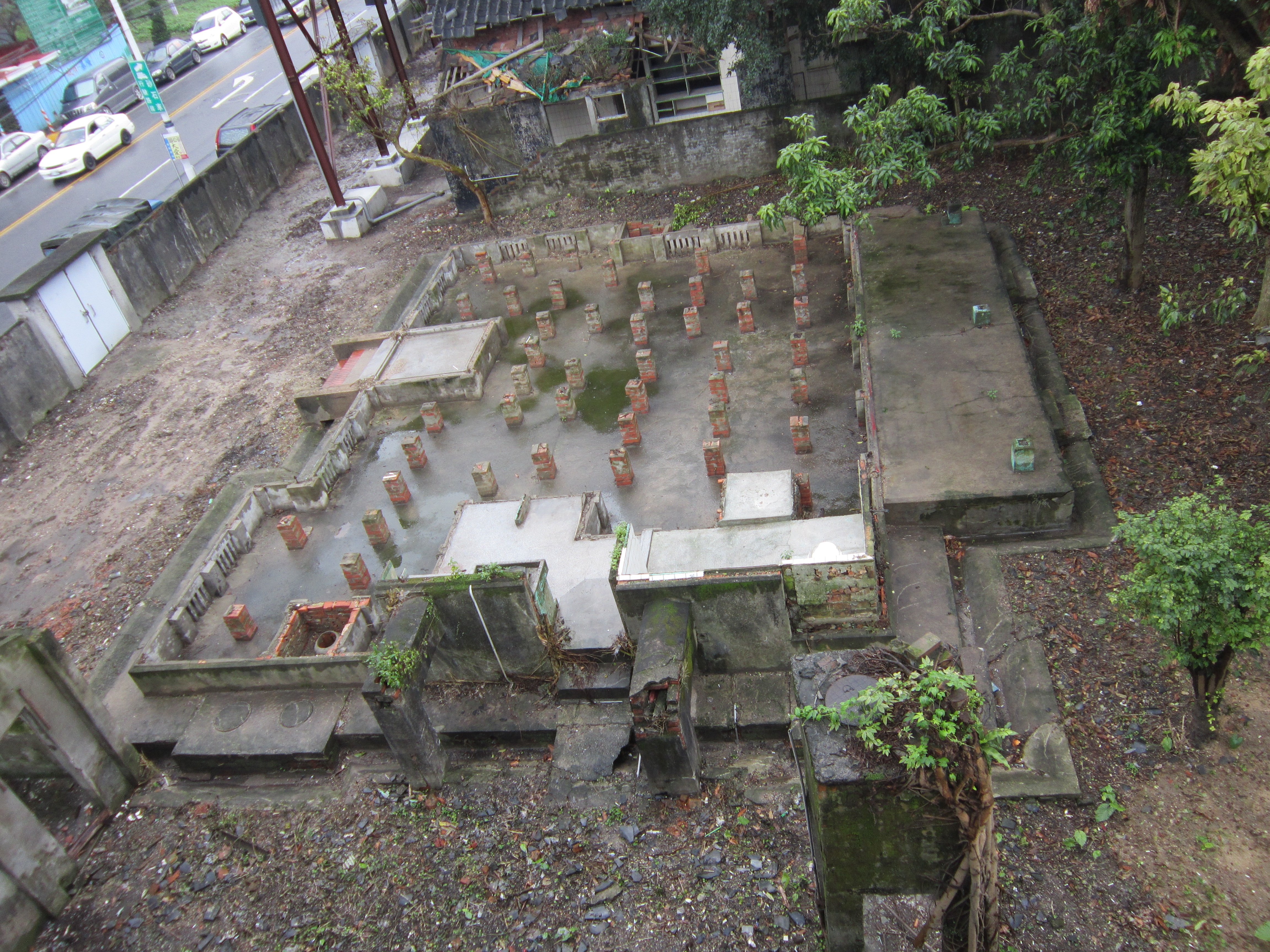 基隆要塞司令部校官眷舍，靠基隆市榮民服務處一側者目前僅剩地基。